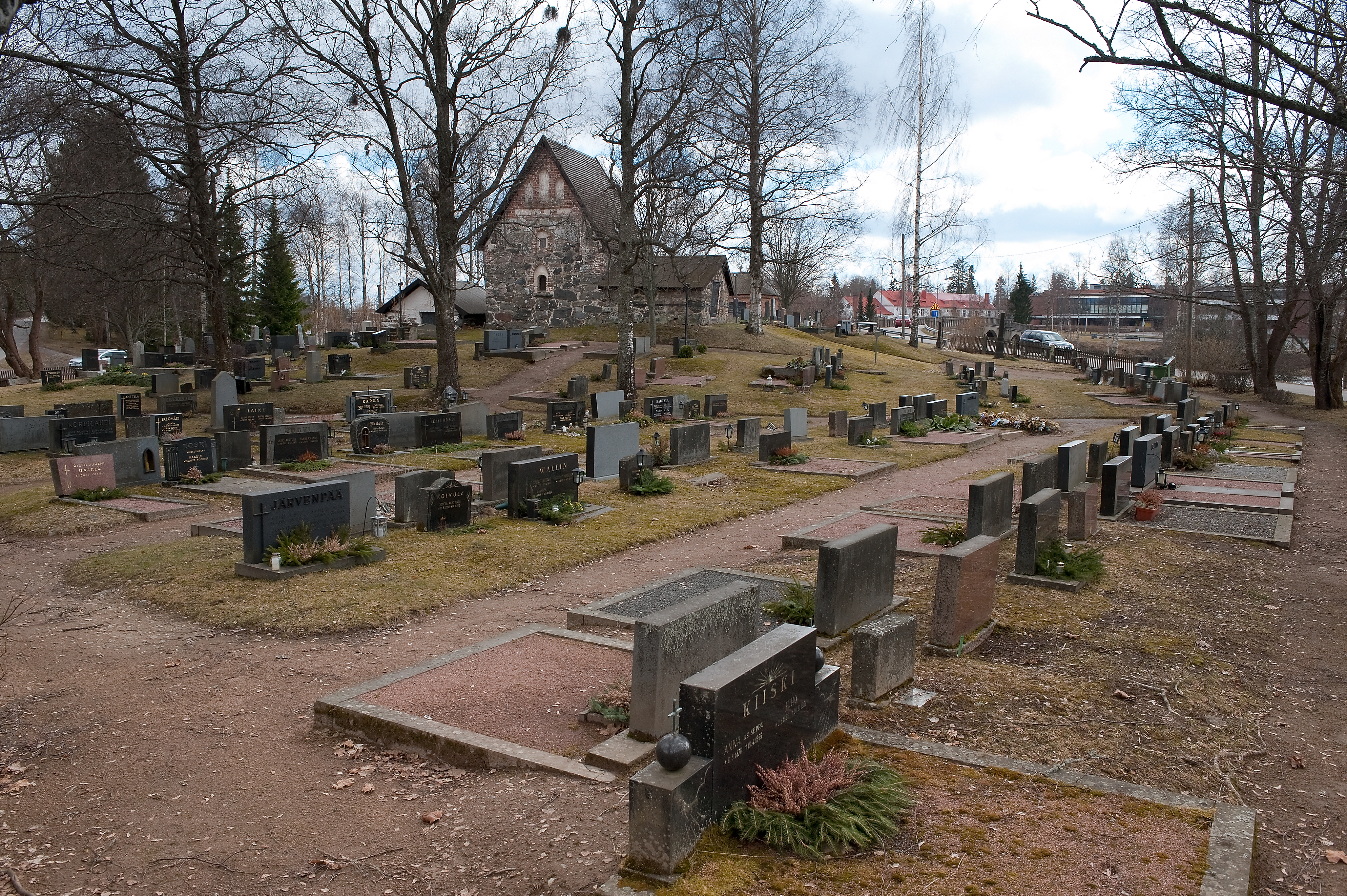 Pyhän Marian sakasti kuvattuna Kakkulaistentien ja Penttiläntien kulmasta.